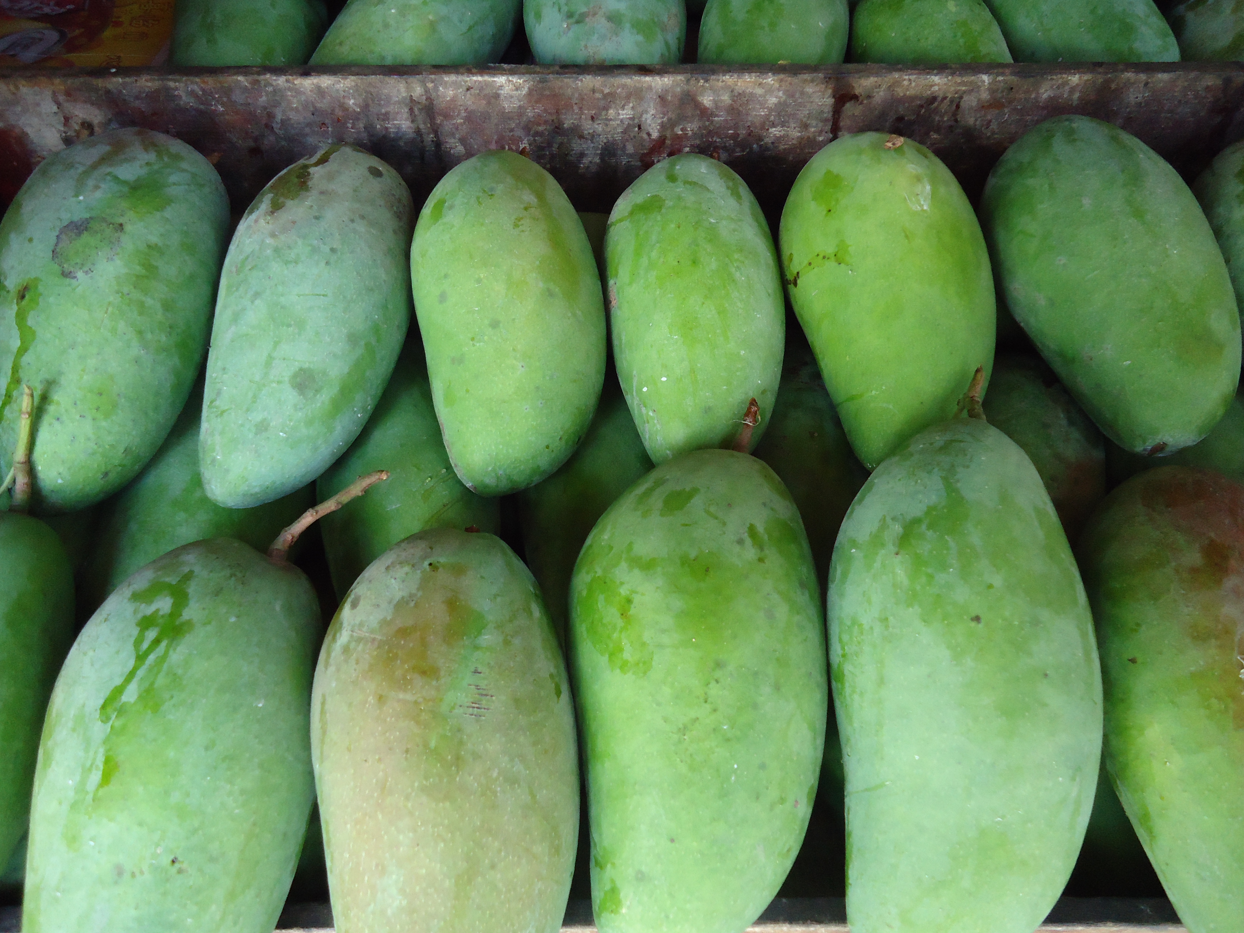 Malaysian Mango